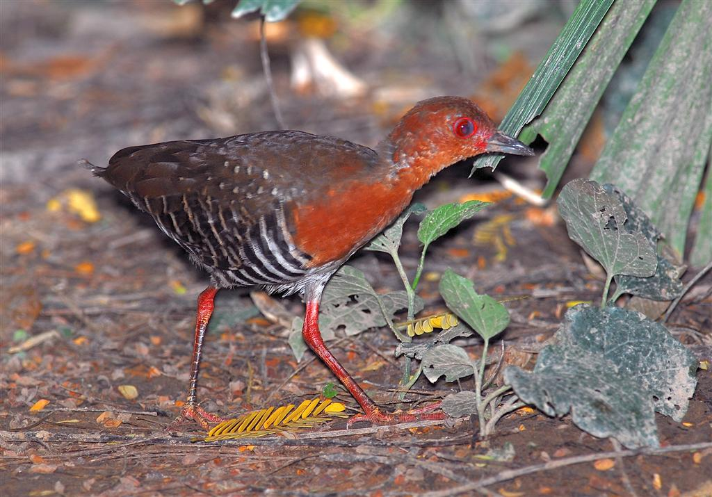 Red-Legged Crake (Rallina fasciata)